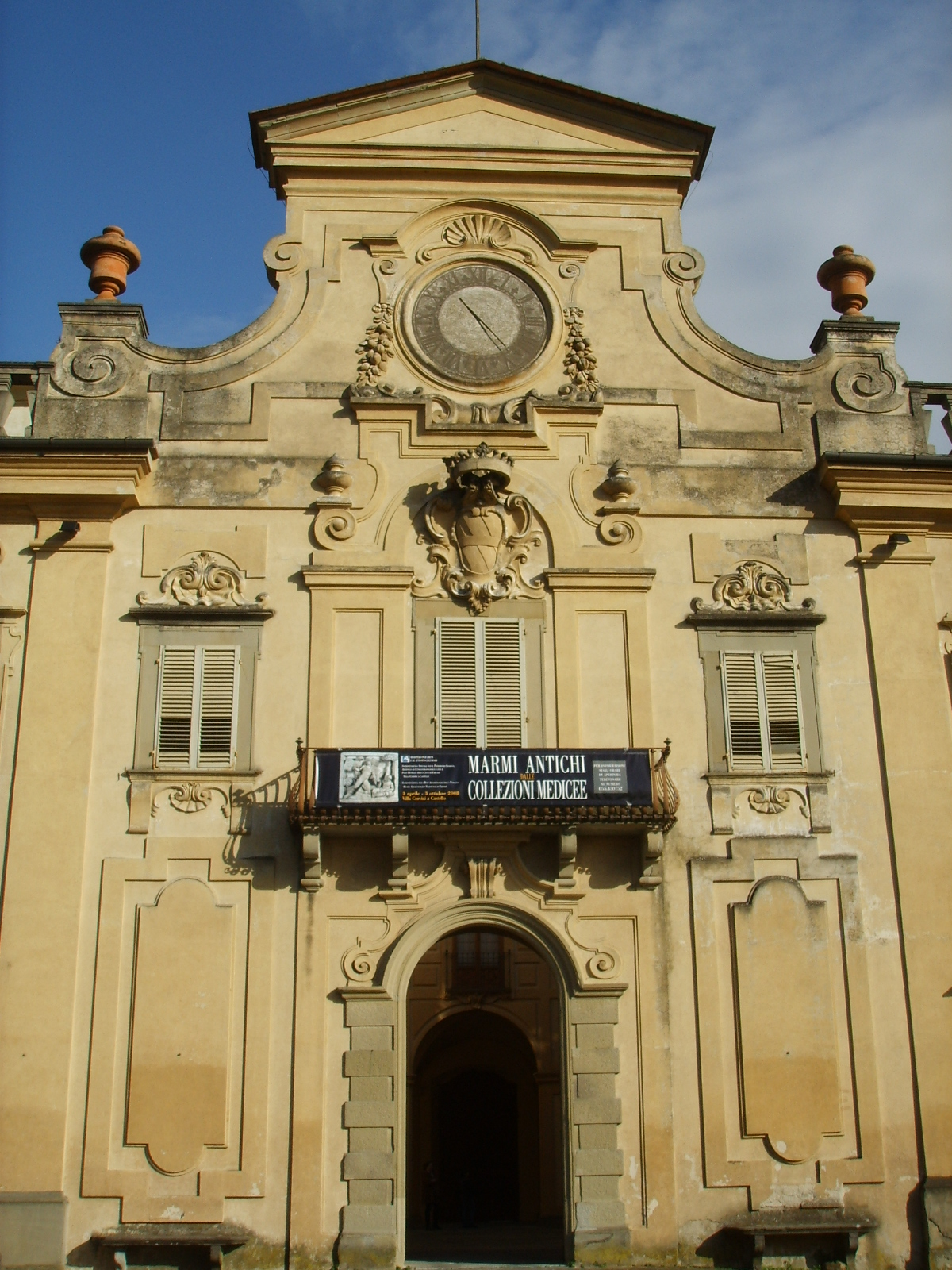 Baroque gable — Villa Corsini (Florence).